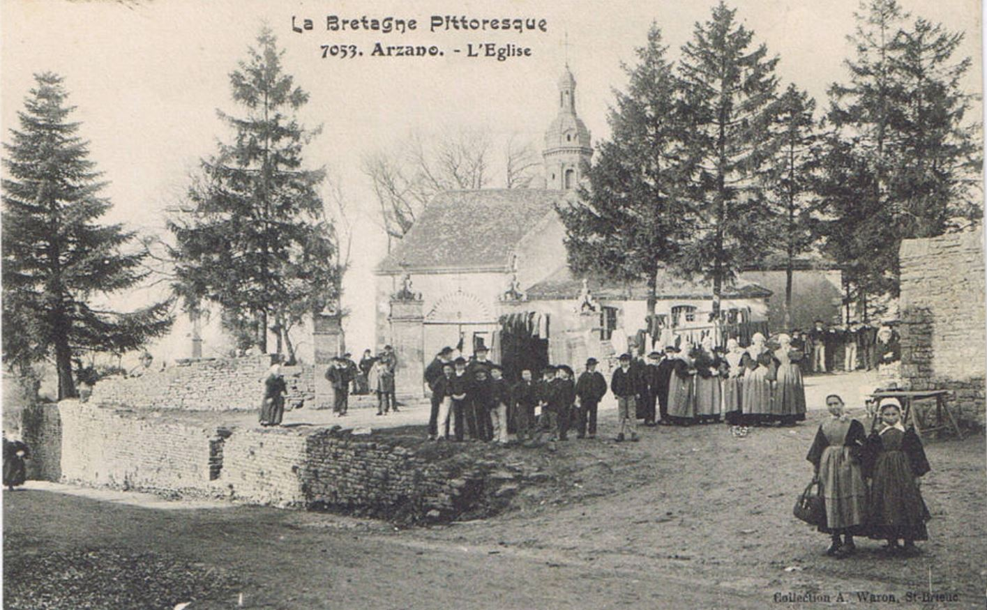 Groupe de paroissiens posant devant l'église d'Arzano dans le Finistère (carte postale A. Waron)